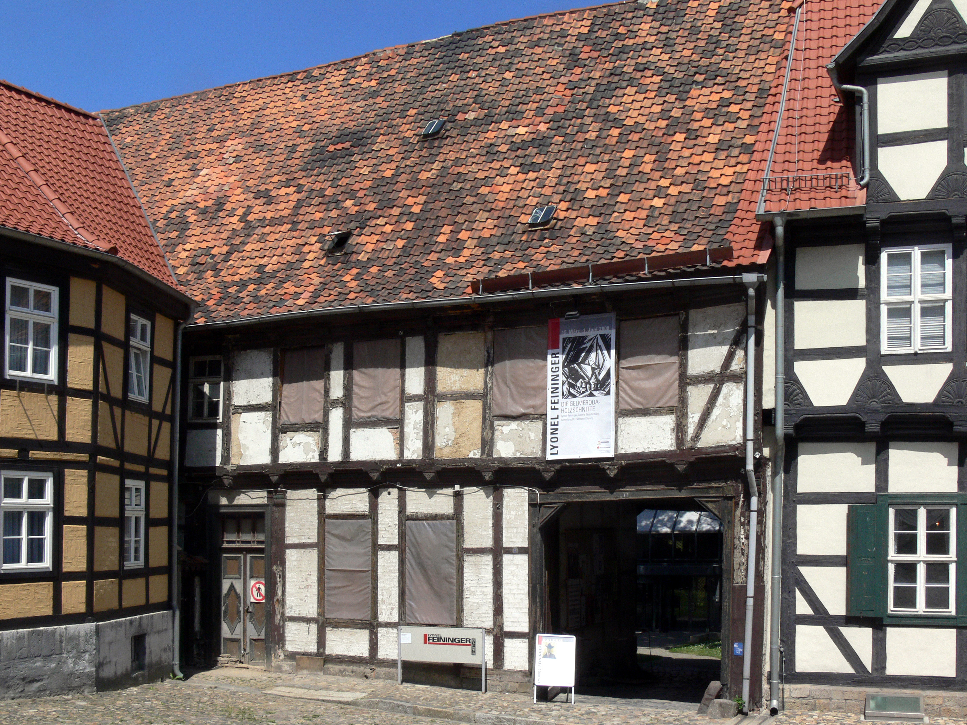 Ehem. Kürasierhof mit Tordurchgang zum Lyonel—Feininger—Museum am Schlossberg in Quedlinburg